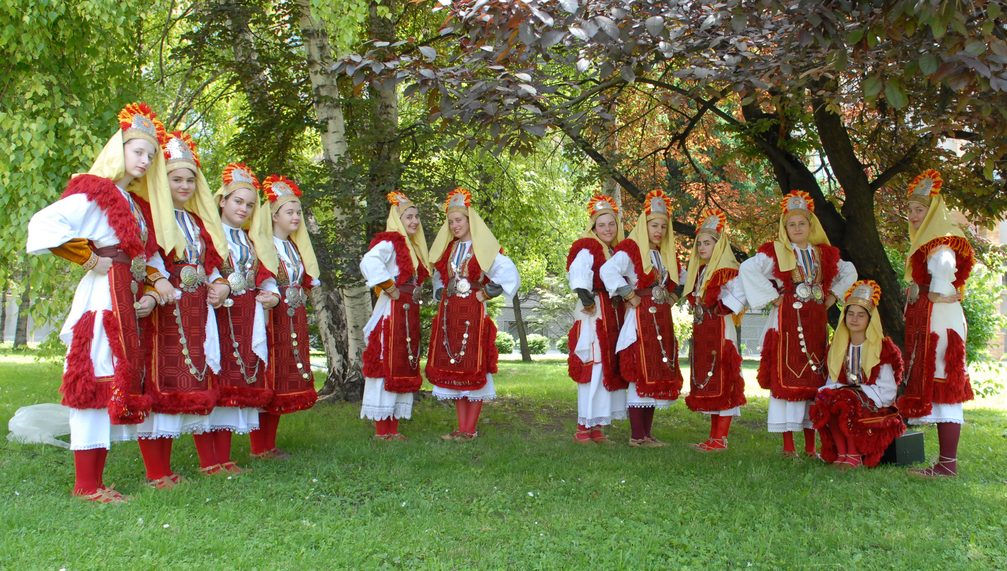 Mariovska nosija